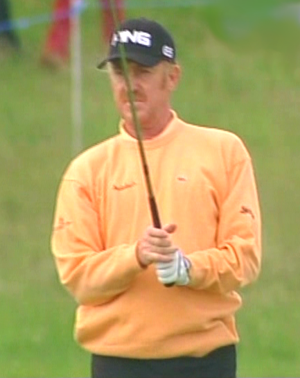 Bildbeschreibung: Miguel Angel Jiménez bei den Austrian Open 2006 Quelle: eigene Aufnahme mit einer Handycam Fotograf/Zeichner: Boss 15:50, 11 June 2006 (UTC) Datum: 10.6.2006 Sonstiges: GNU